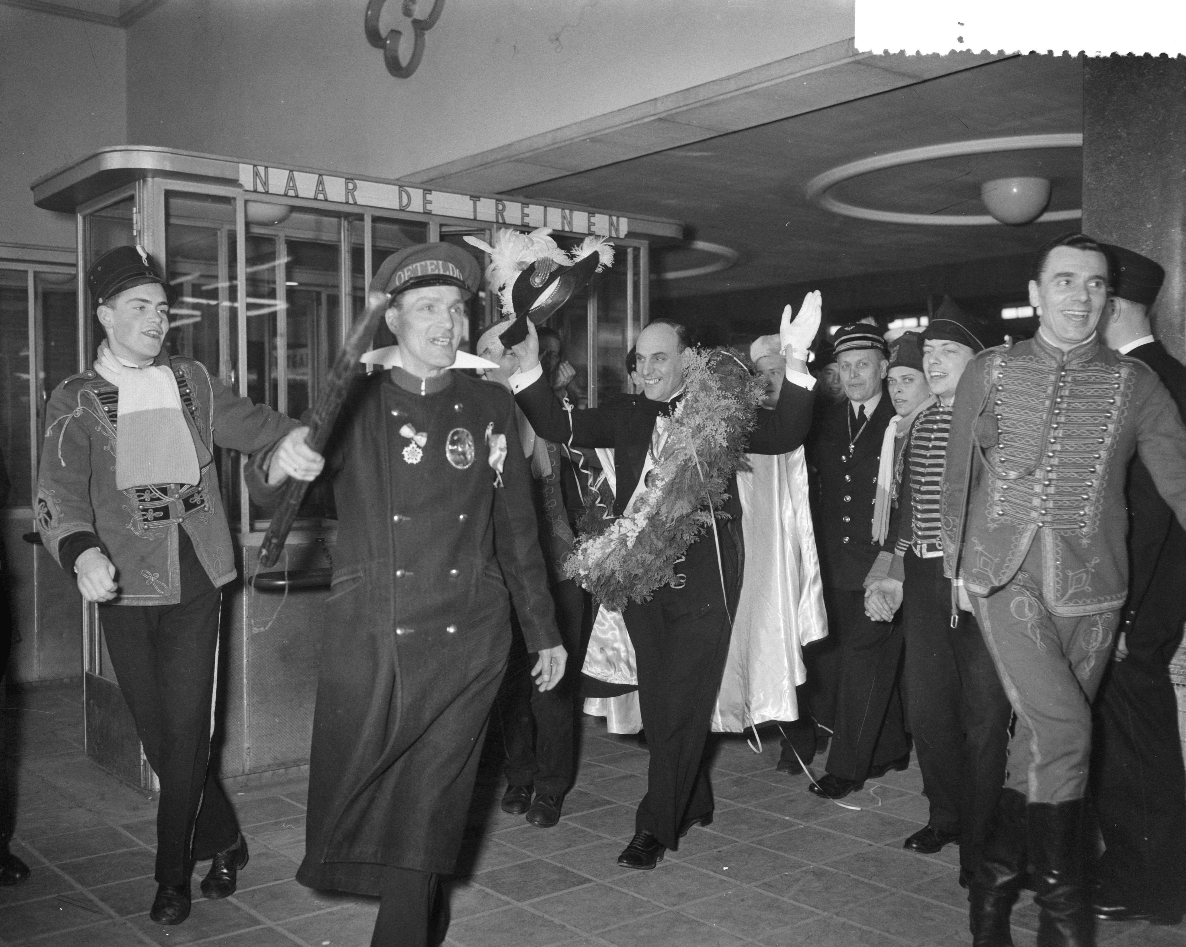 Collectie / Archief : Fotocollectie Anefo Reportage / Serie : [ onbekend ] Beschrijving : Intocht Prins Carnaval Den Bosch en ontvangst stadhuis Datum : 3 maart 1957 Locatie : Den Bosch Trefwoorden : Carnaval, Intocht, Ontvangsten, STADHUIS Fotograaf : Bilsen, Joop van / Anefo Auteursrechthebbende : Nationaal Archief Materiaalsoort : Negatief (zwart/wit) Nummer archiefinventaris : bekijk toegang 2.24.01.04 Bestanddeelnummer : 908-3698